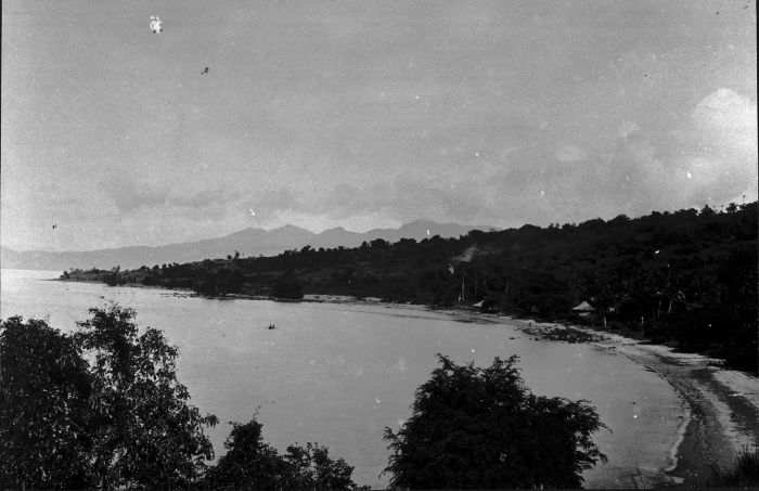 Foto. Kustgezicht bij Waibalong in Straat Flores